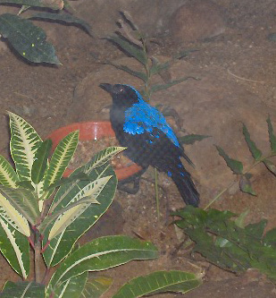 Species Irena pulella Family Irenidae